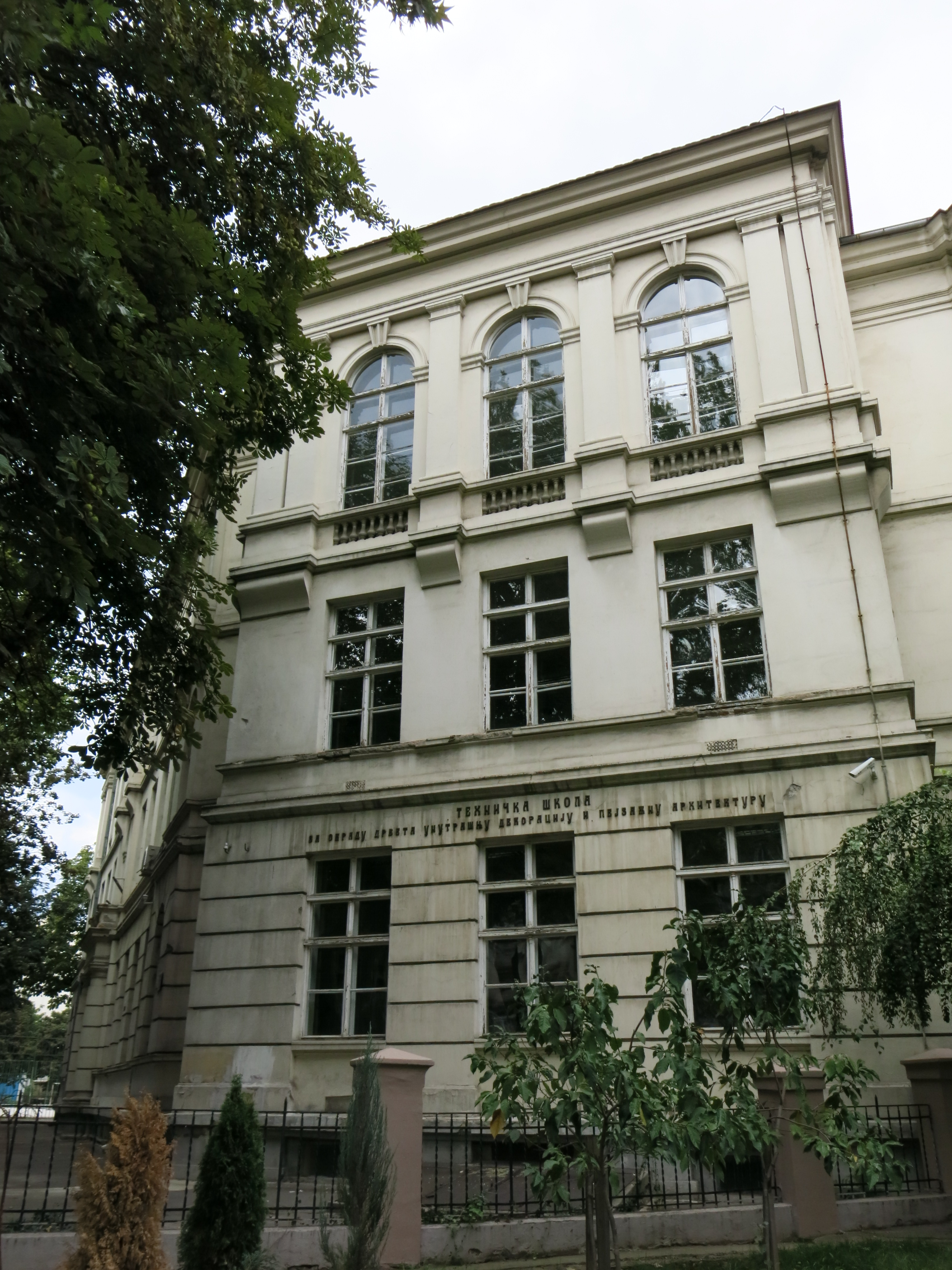 Дорћолска основна школа